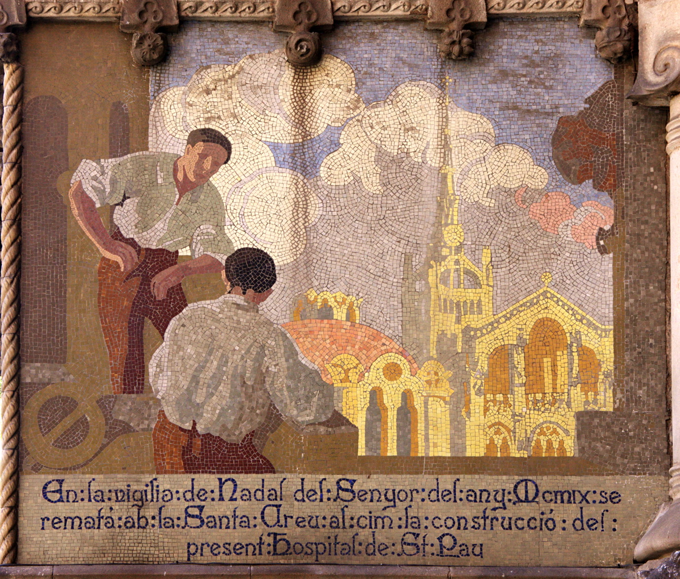 mosaic núm. 15 de la sèrie de plafons de l'Hospital de Sant Pau (Barcelona, Catalunya). És obra de Lluís Brú, 1923.